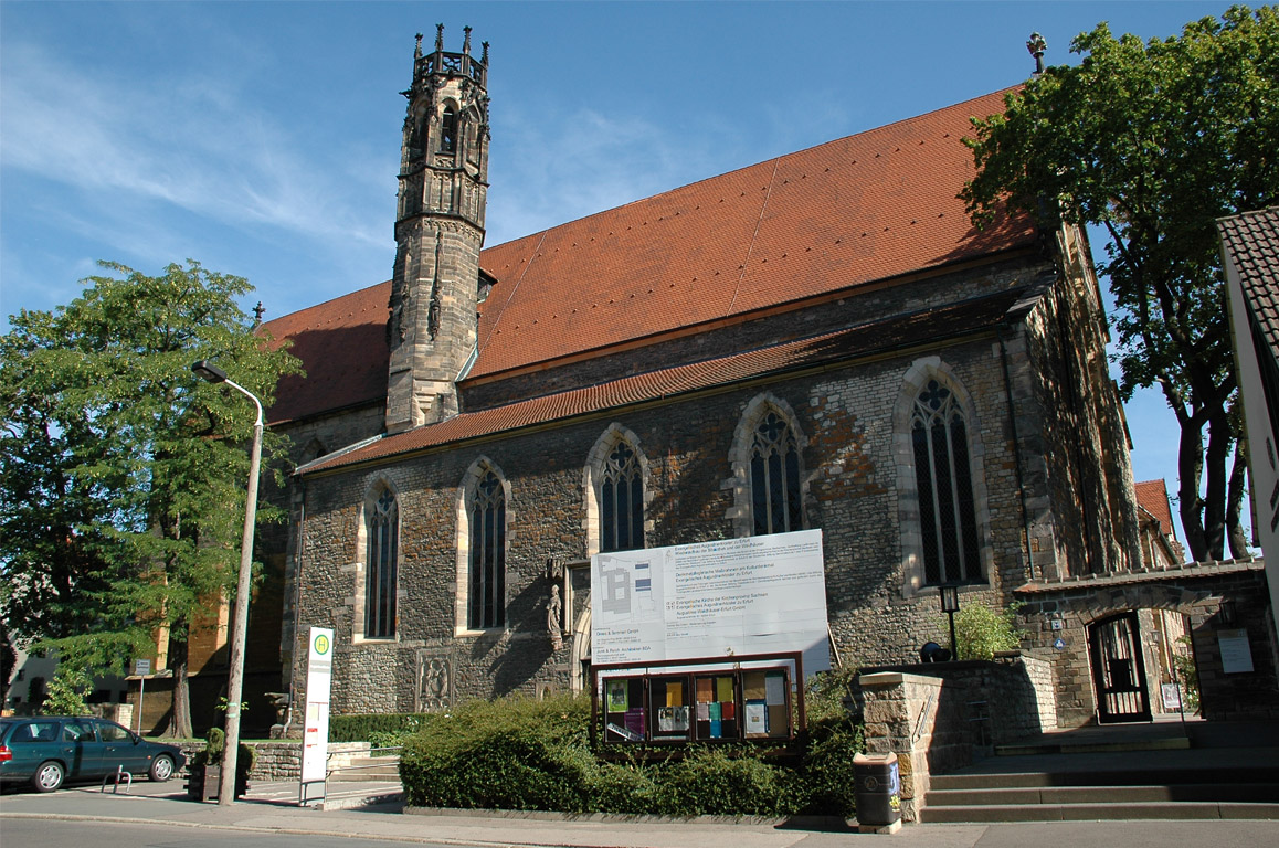 Augustinerkirche (errichtet 1277) in der Augustinerstraße in Erfurt